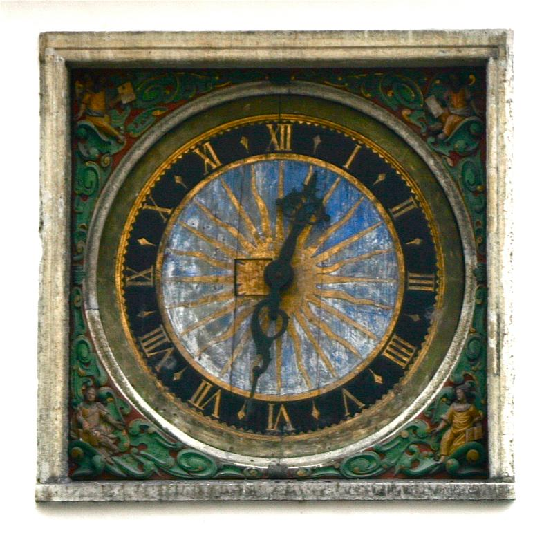 Tallinn landmark, on the wall of the Holy Spirit Church.